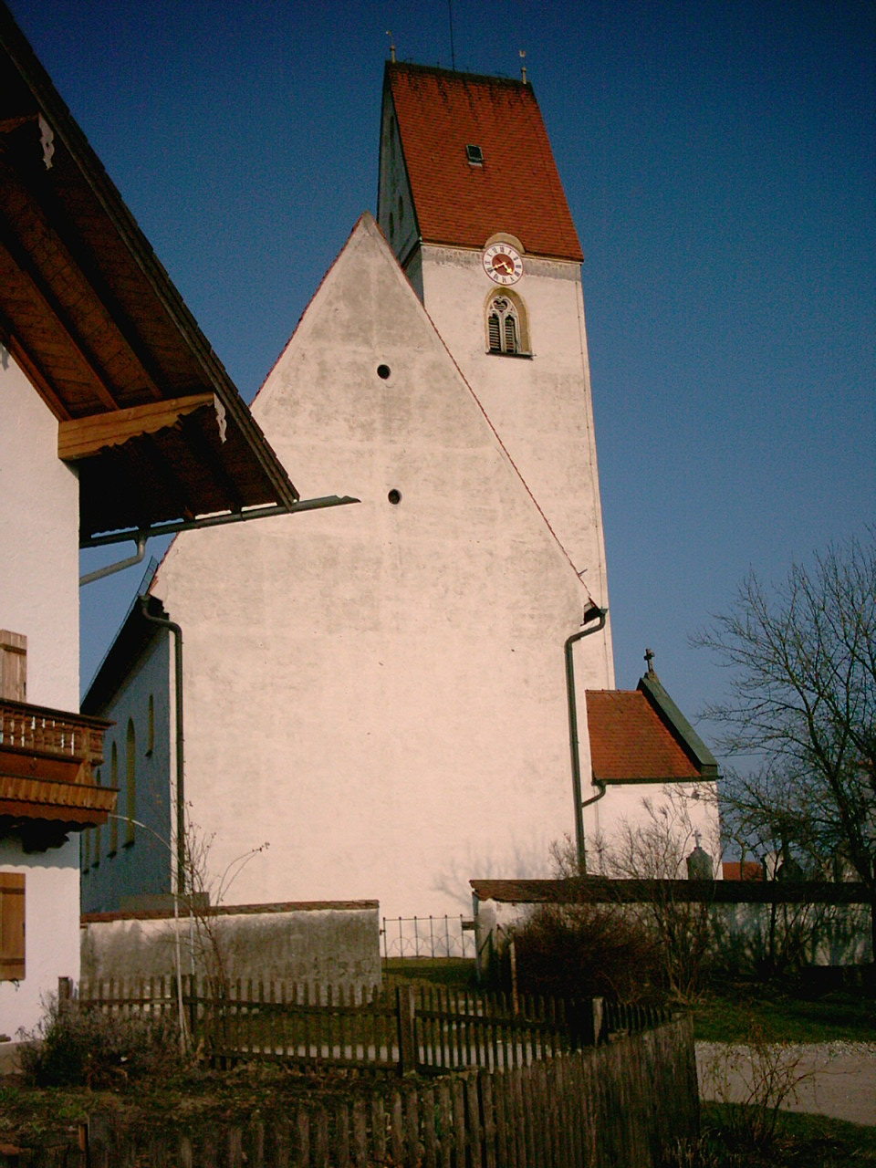 Kirche in Straßkirchen, Vogtareuth, Landkreis Rosenheim